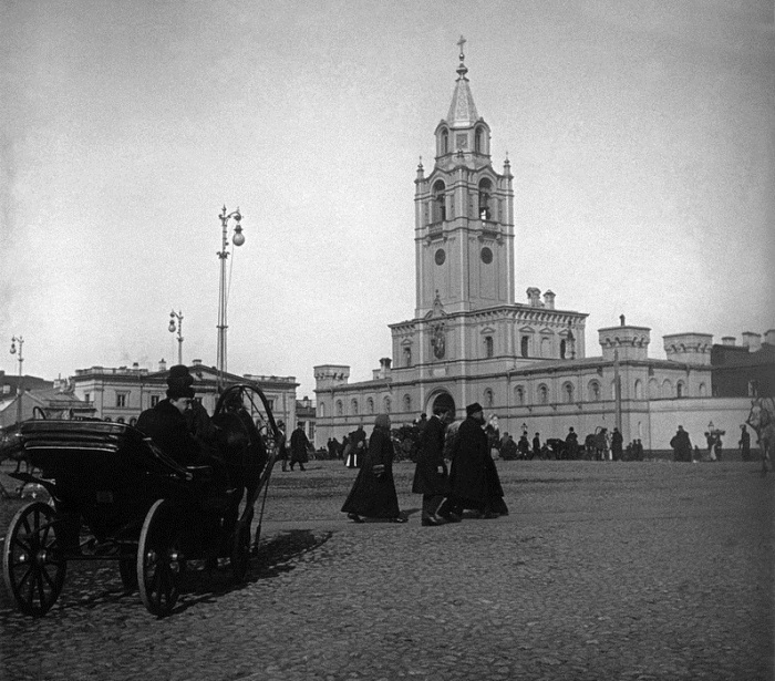 Страстной монастырь на Страстной площади (ныне Пушкинской) в 1910-е годы